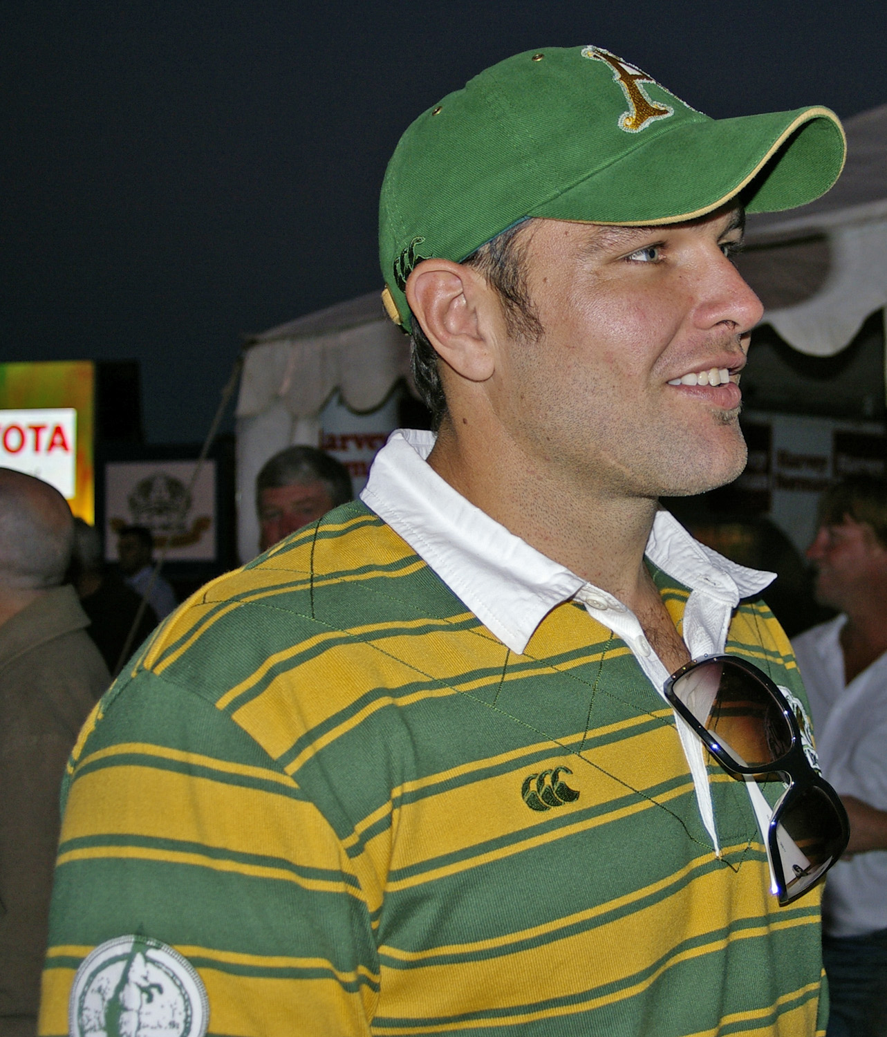 Todd Payten